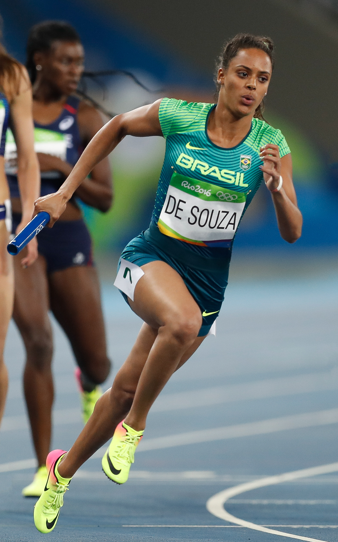 Rio de Janeiro - Eliminatórias do revezamento 4 x 400m nos Jogos Rio 2016, no Estádio Olímpico (Fernando Frazão/Agência Brasil)